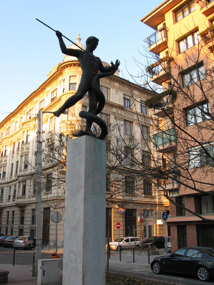 A Rózsa Ferenc emlékkút a budapesti VII. ker. Szenes Hanna parkban. A 2 m-es bronz szobrot Mikus Sándor készítette 1966-ban